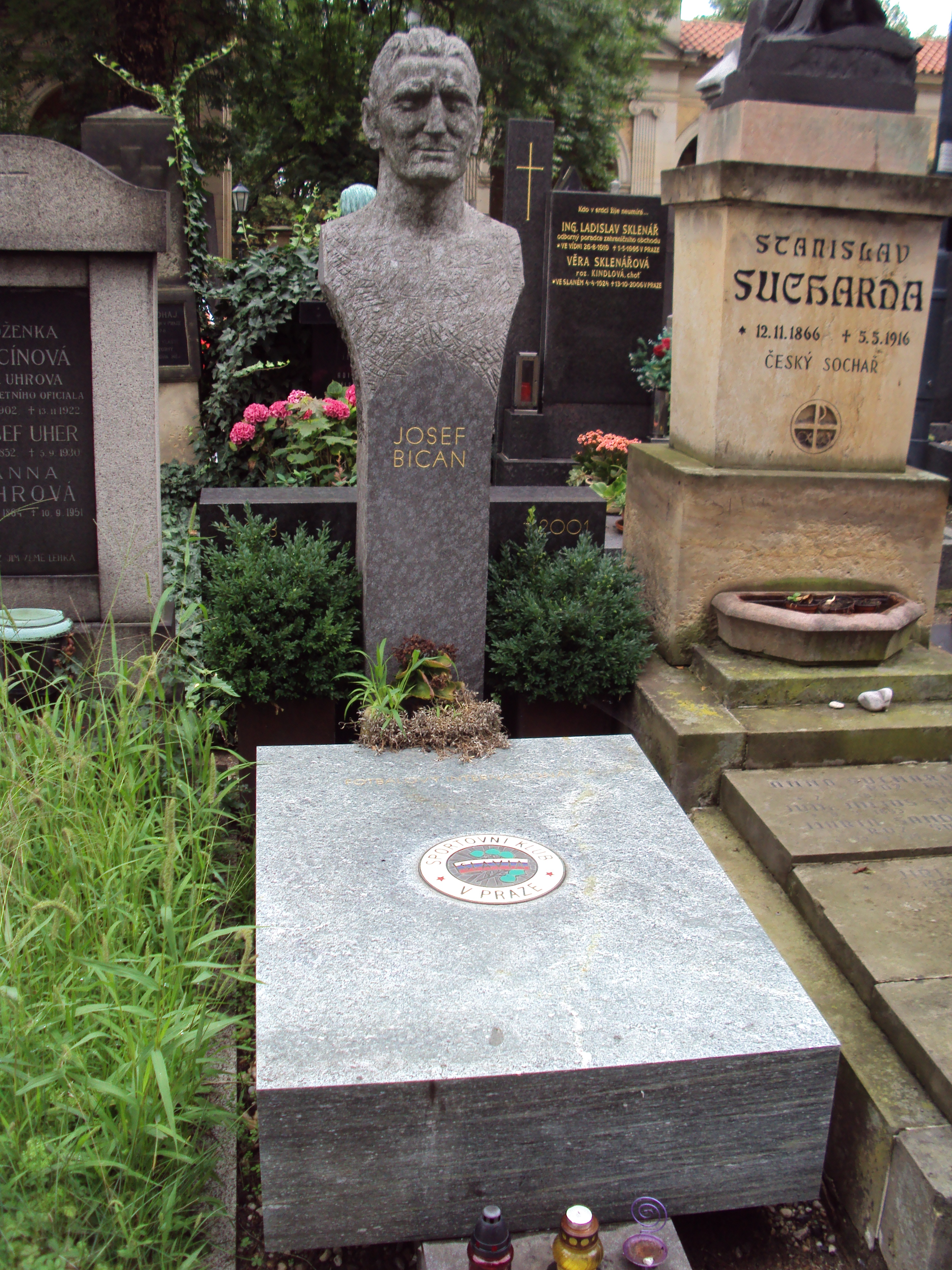 Hrob fotbalisty Bicana na Vyšehradském hřbitově